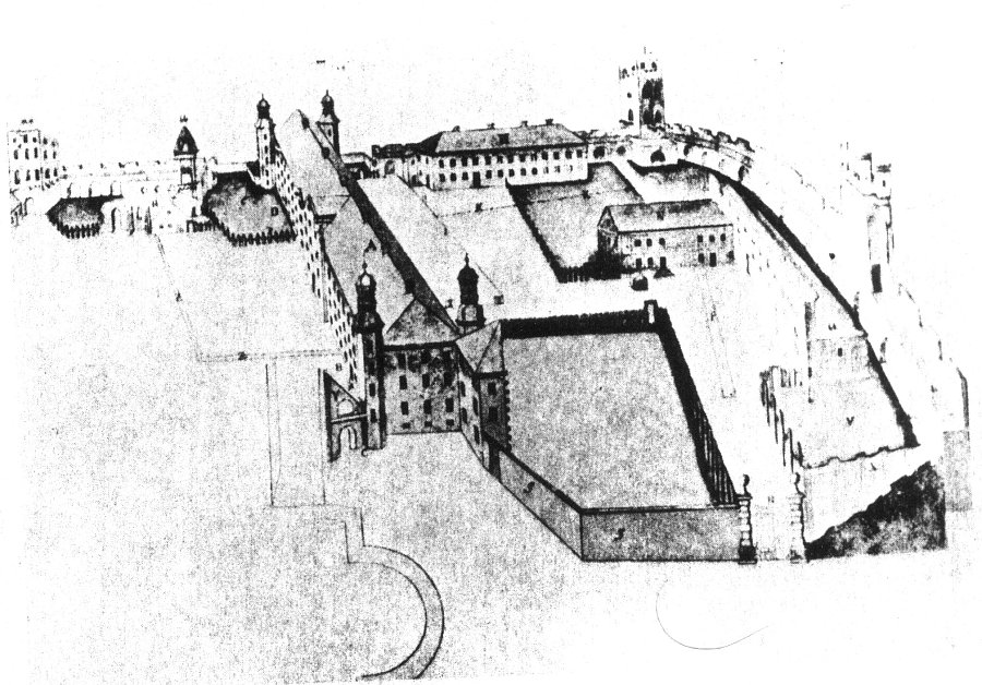 Speyer, ehem. Bischöfliche Pfalz, Faustplan von 1765